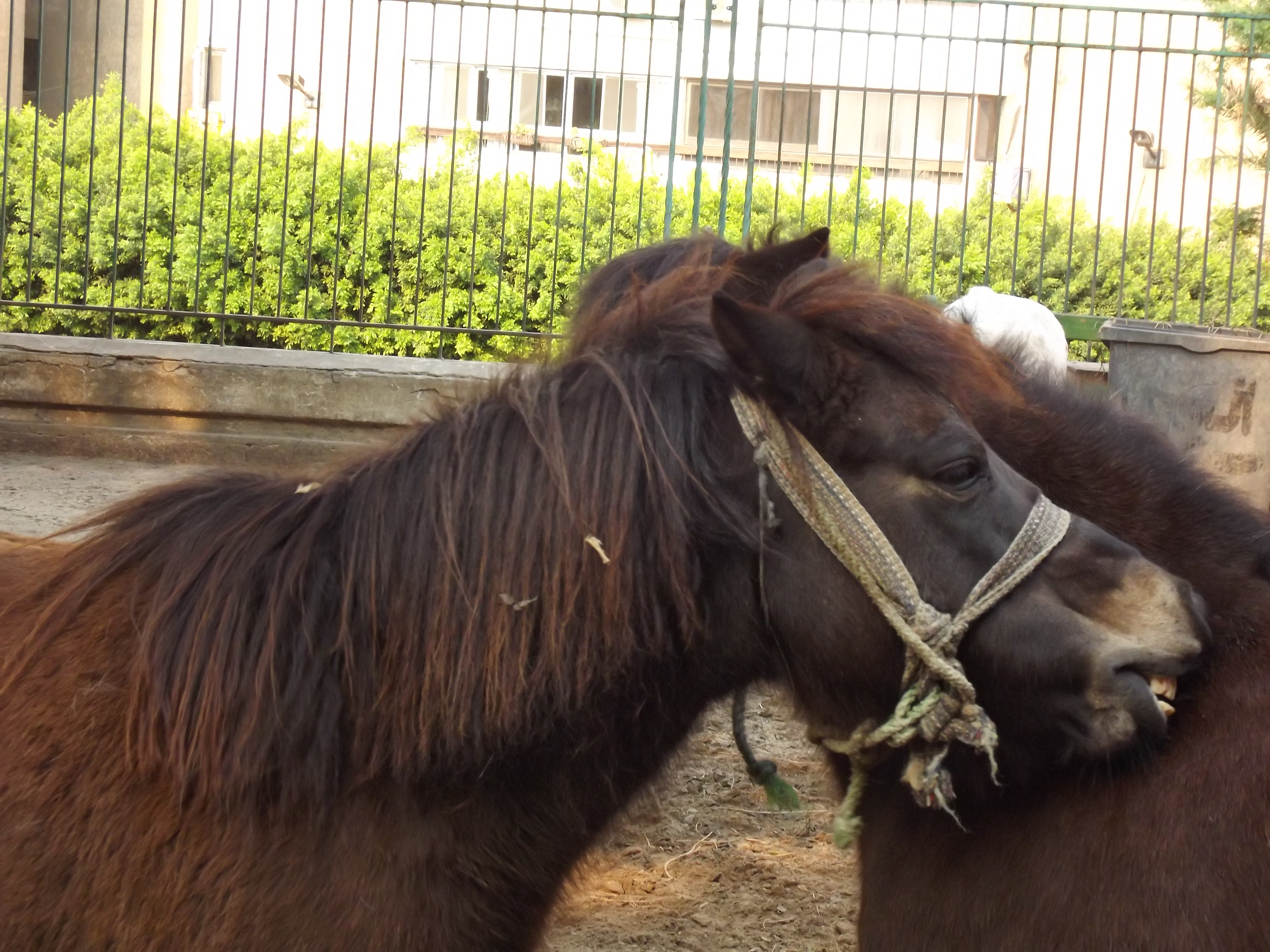 سيسي في حديقة حيوان النزهة - الاسكندرية